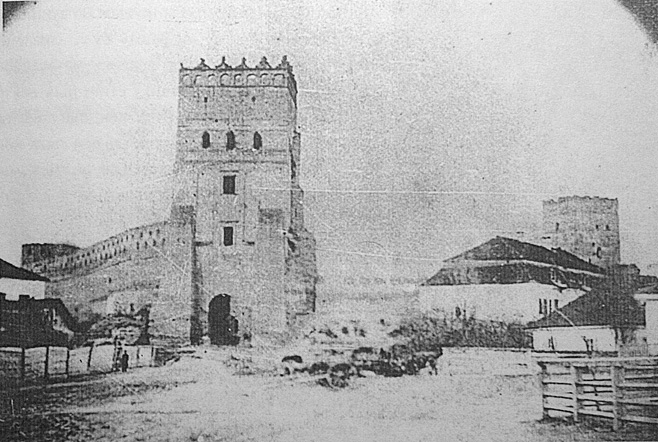 Перша фотографія замку і Луцька взагалі